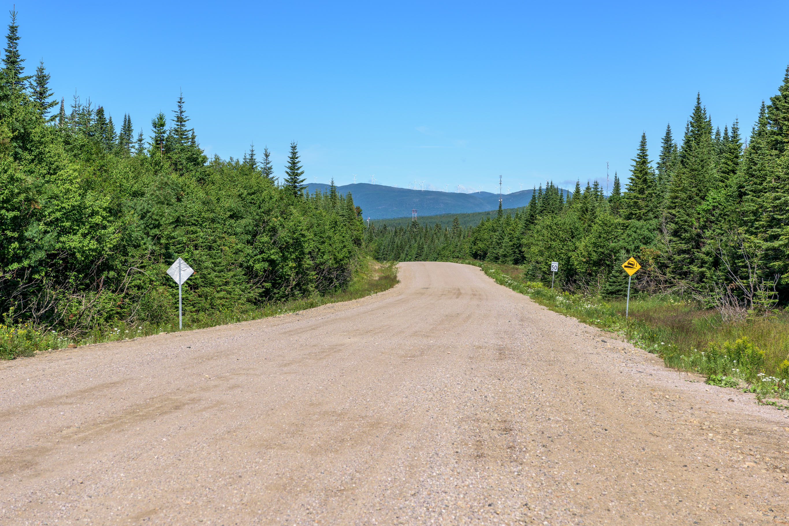 Massif de Charlevoix, Québec, Canada